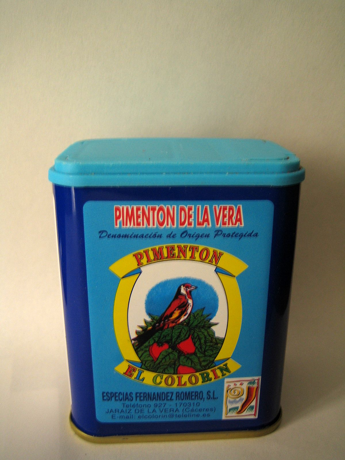 Boîte de pimentón